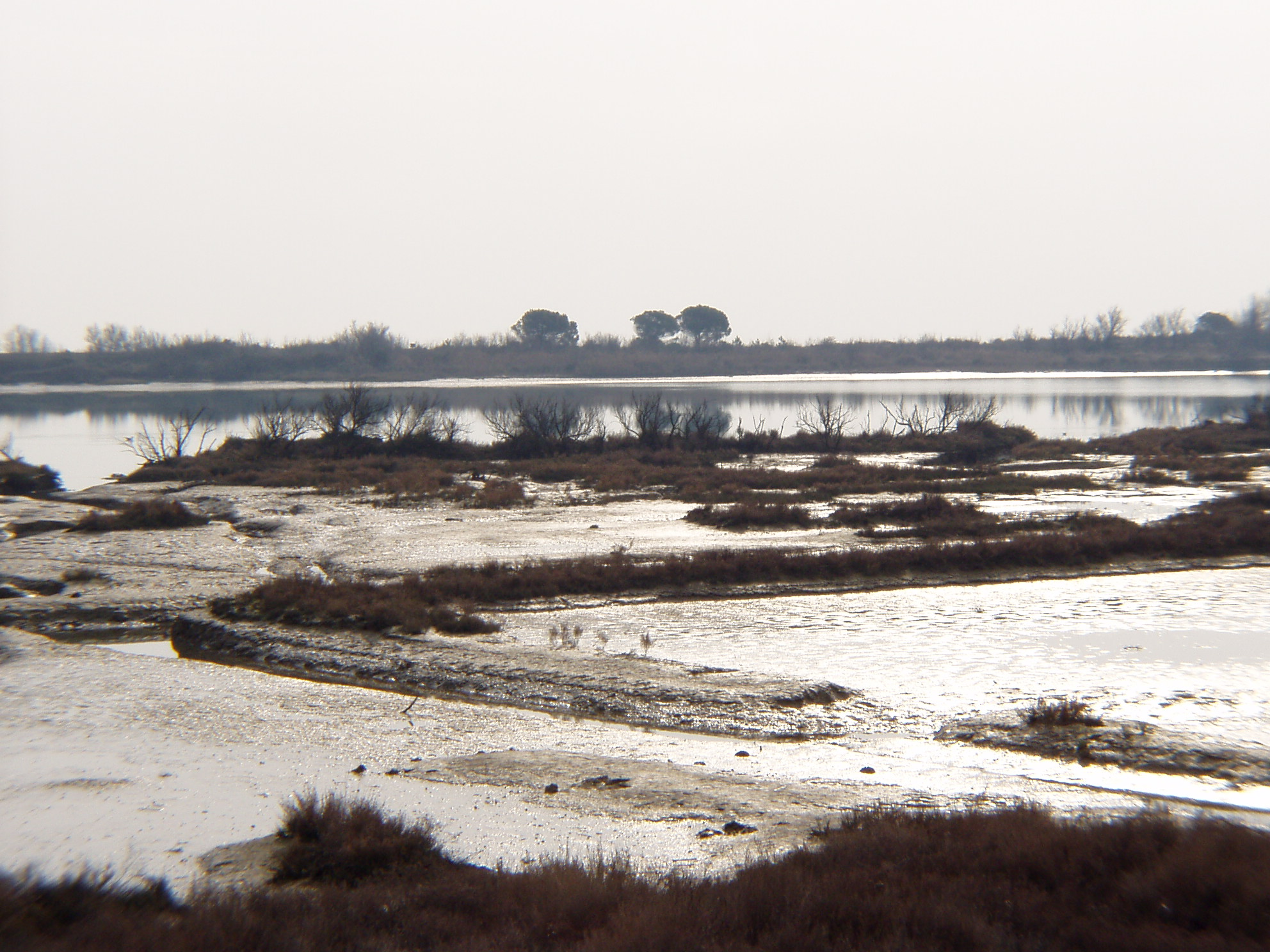 Foto della laguna del mort d'inverno.